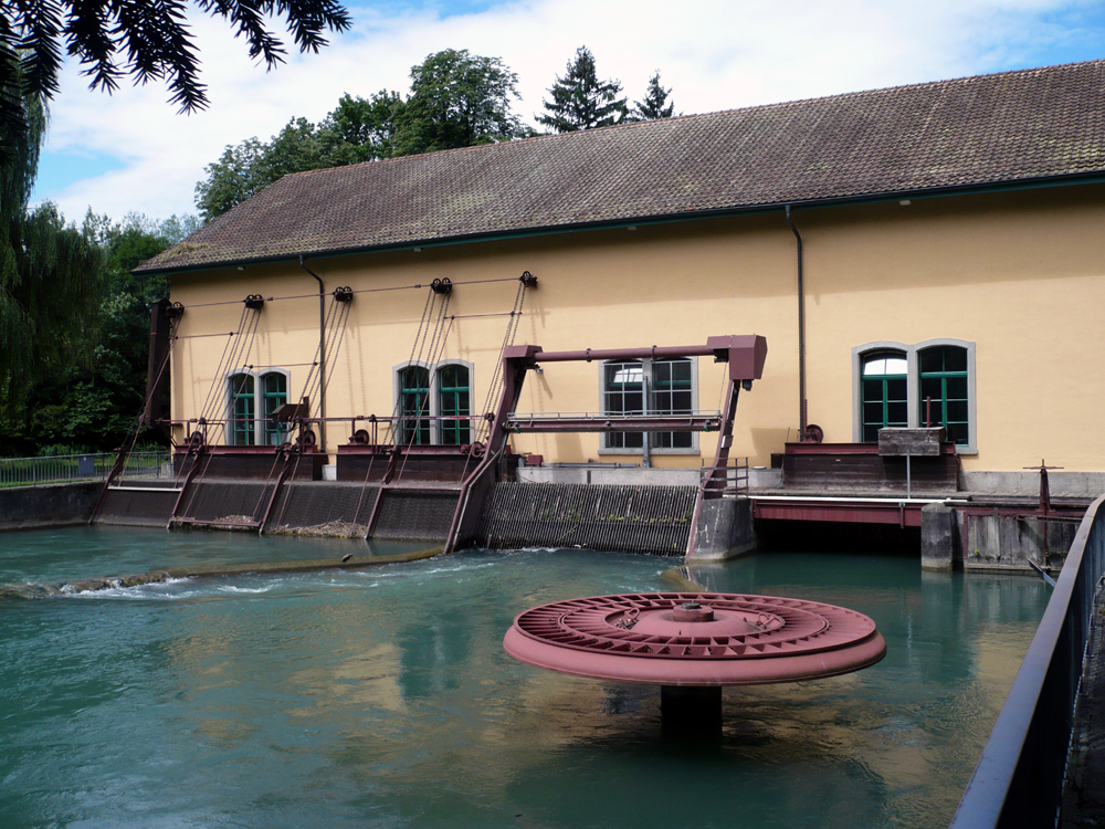 Stadt Zürich: EWZ Kraftwerk Höngg an der Limmat